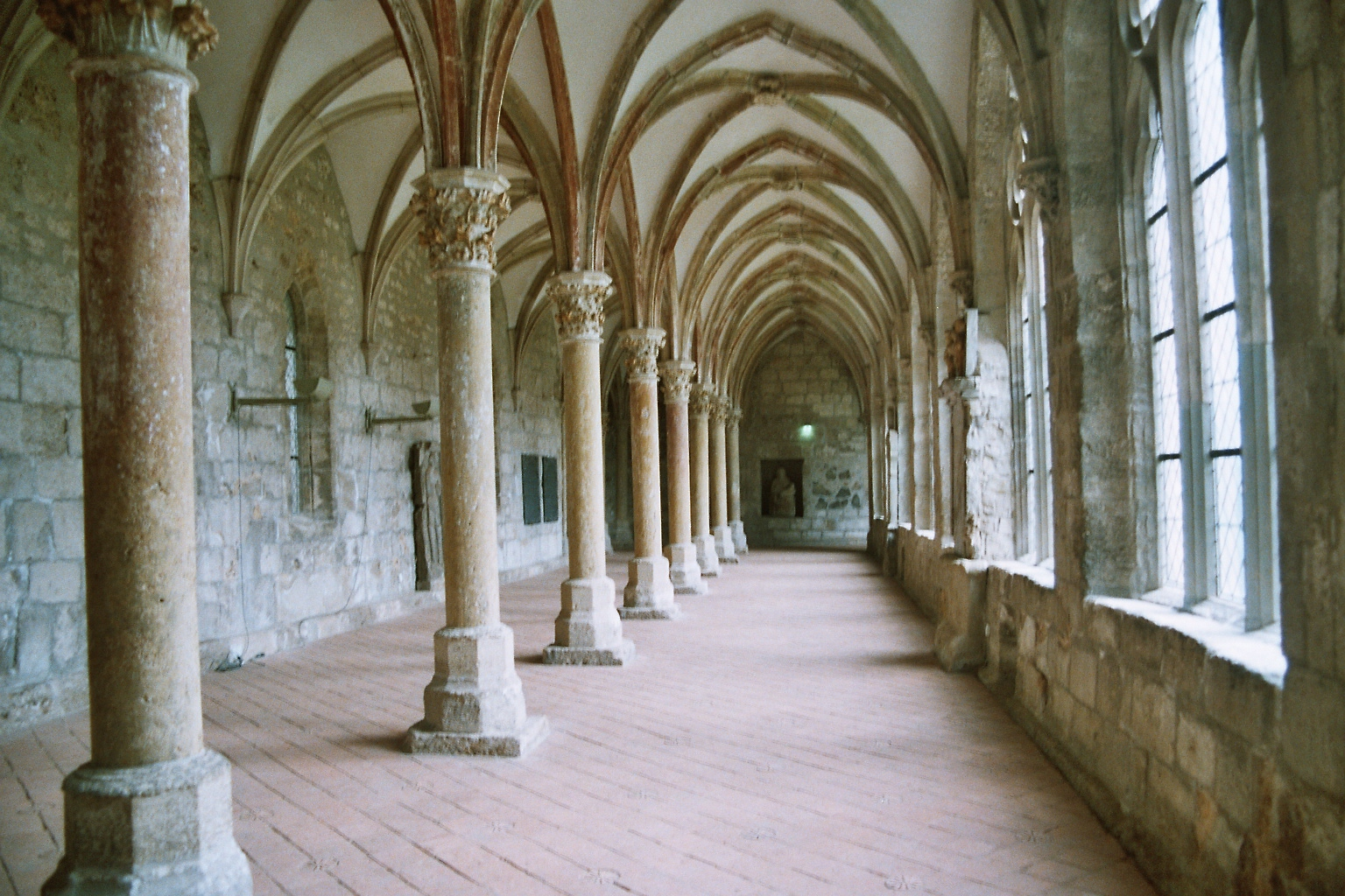 Kreuzgang des Klosters Walkenried